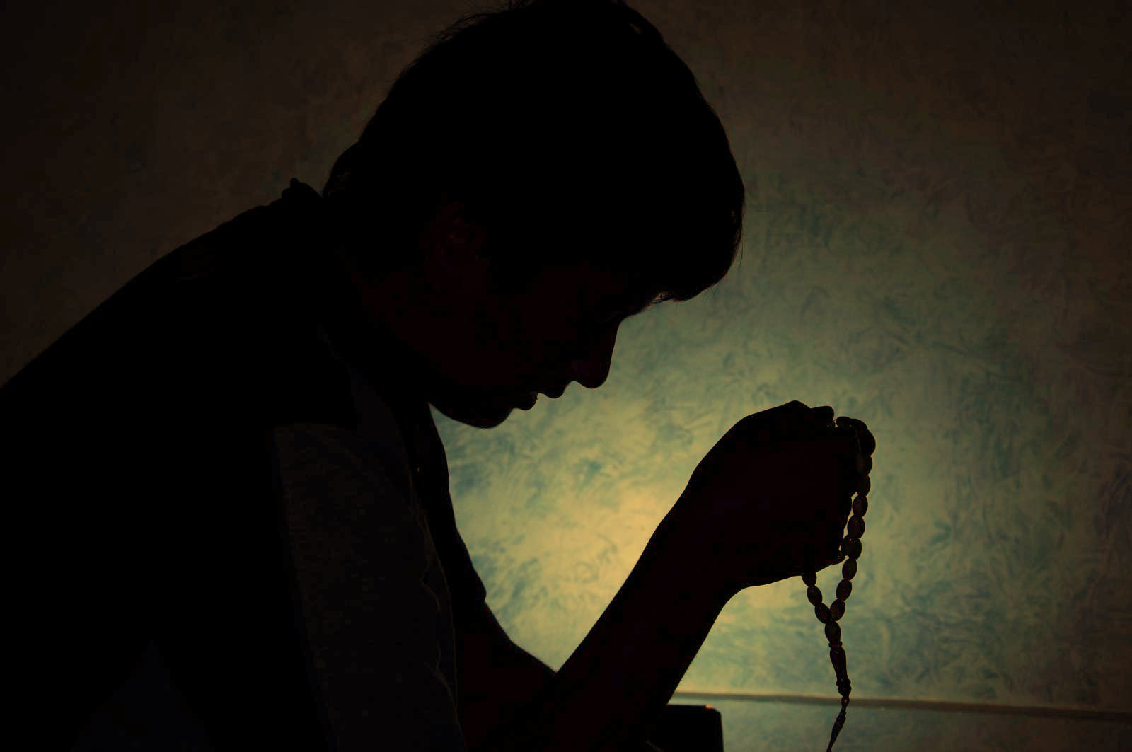 Muslim prayer beads